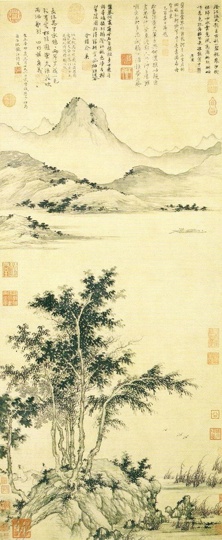 Attente du bac près d'un fleuve en automne, 1351, par le peintre chinois Sheng Mao (1310-1360). Rouleau mural, encre sur papier, 112,5x46,3cm. Musée du palais impérial, Beijing.